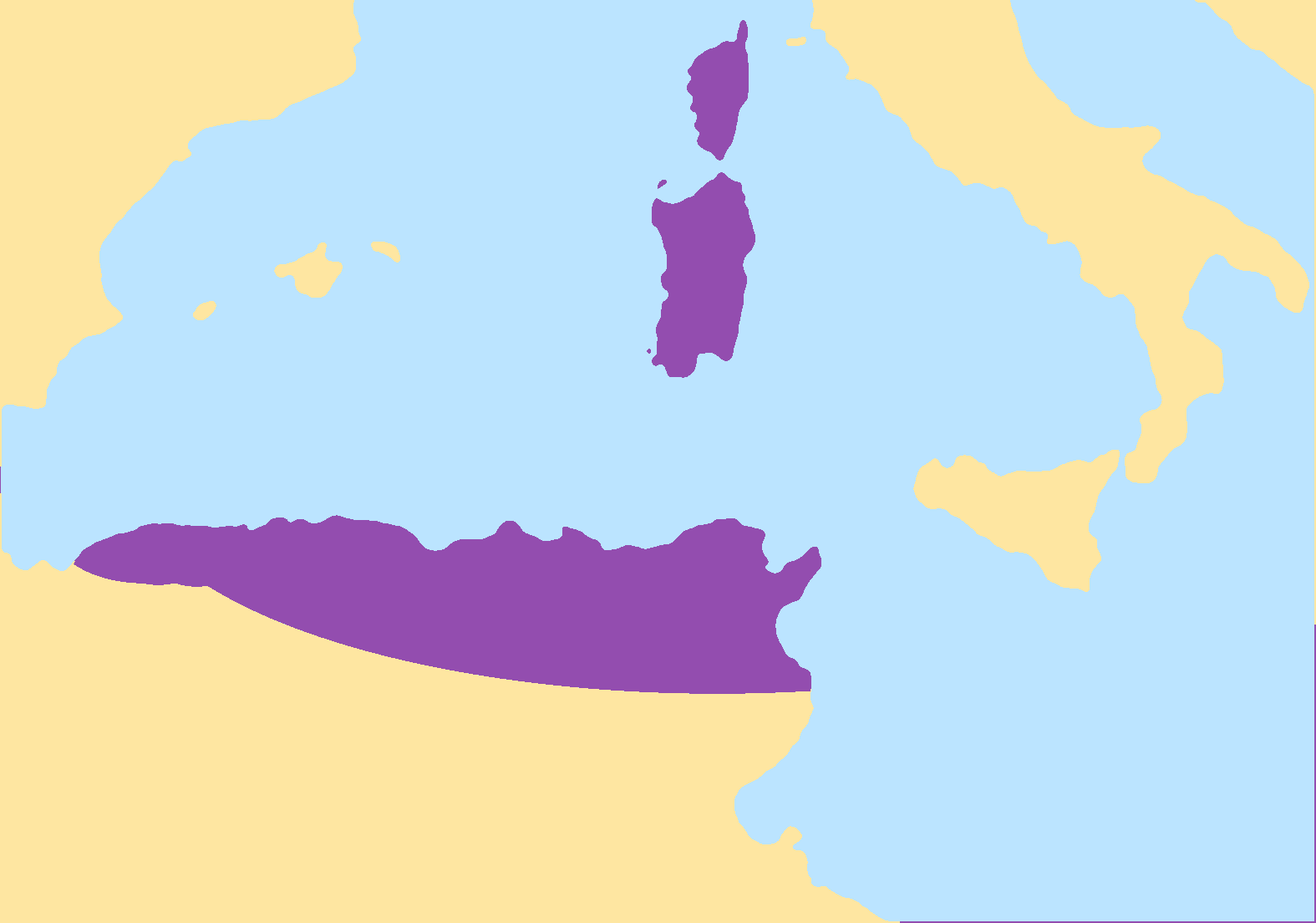 auteur:user:yugiz Cette carte représente l'emplacement approximatif de l'empire des vandales d'Afrique vers 450.